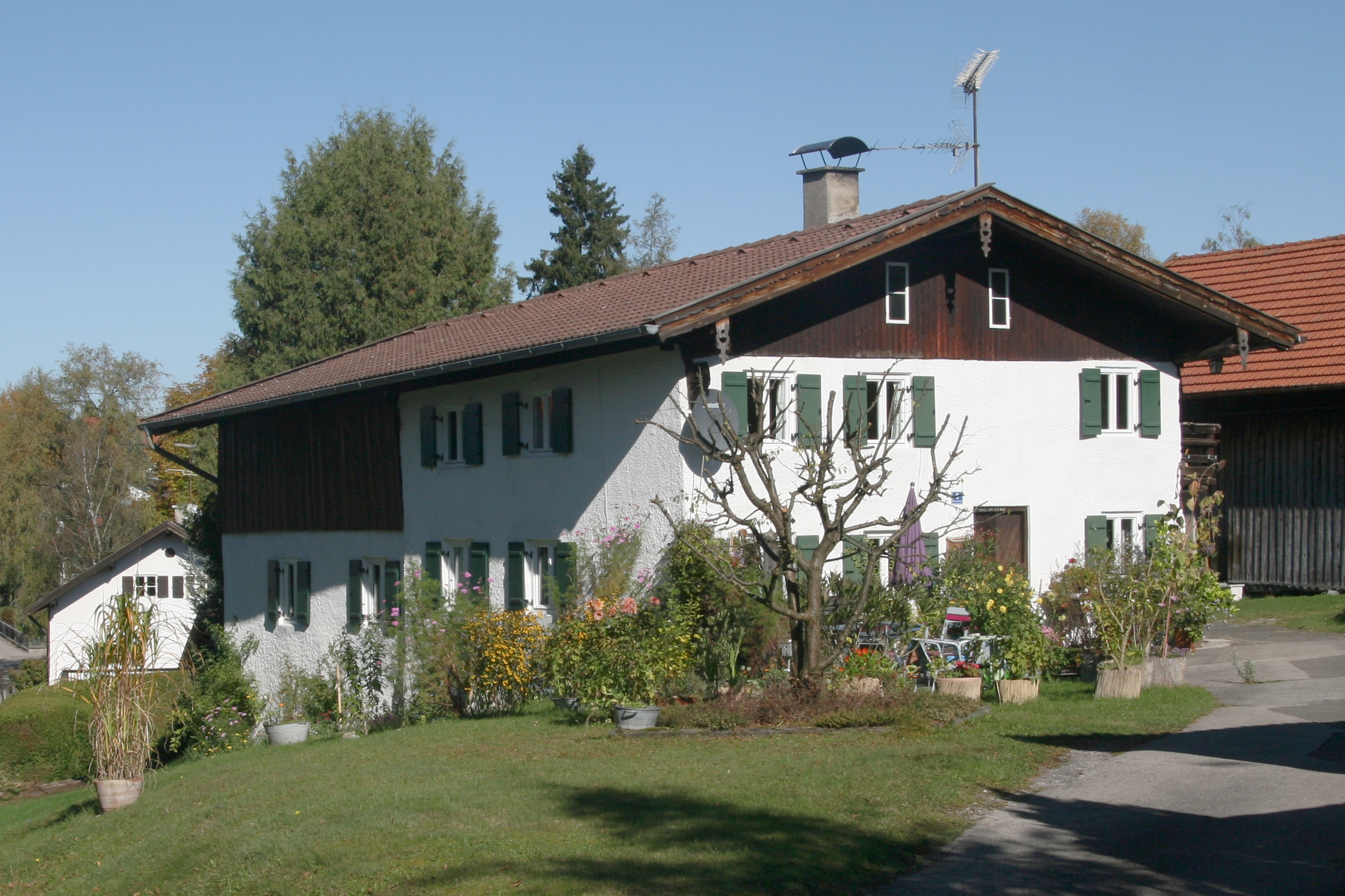 Zweigeschossiger Einfirsthof mit flachem Satteldach in Iffeldorf, verputzter Blockbau, 17./18. Jahrhundert. This is the photograph of an architectural monument. It is part of the list of cultural monuments of Bayern, no. D-1-90-132-5